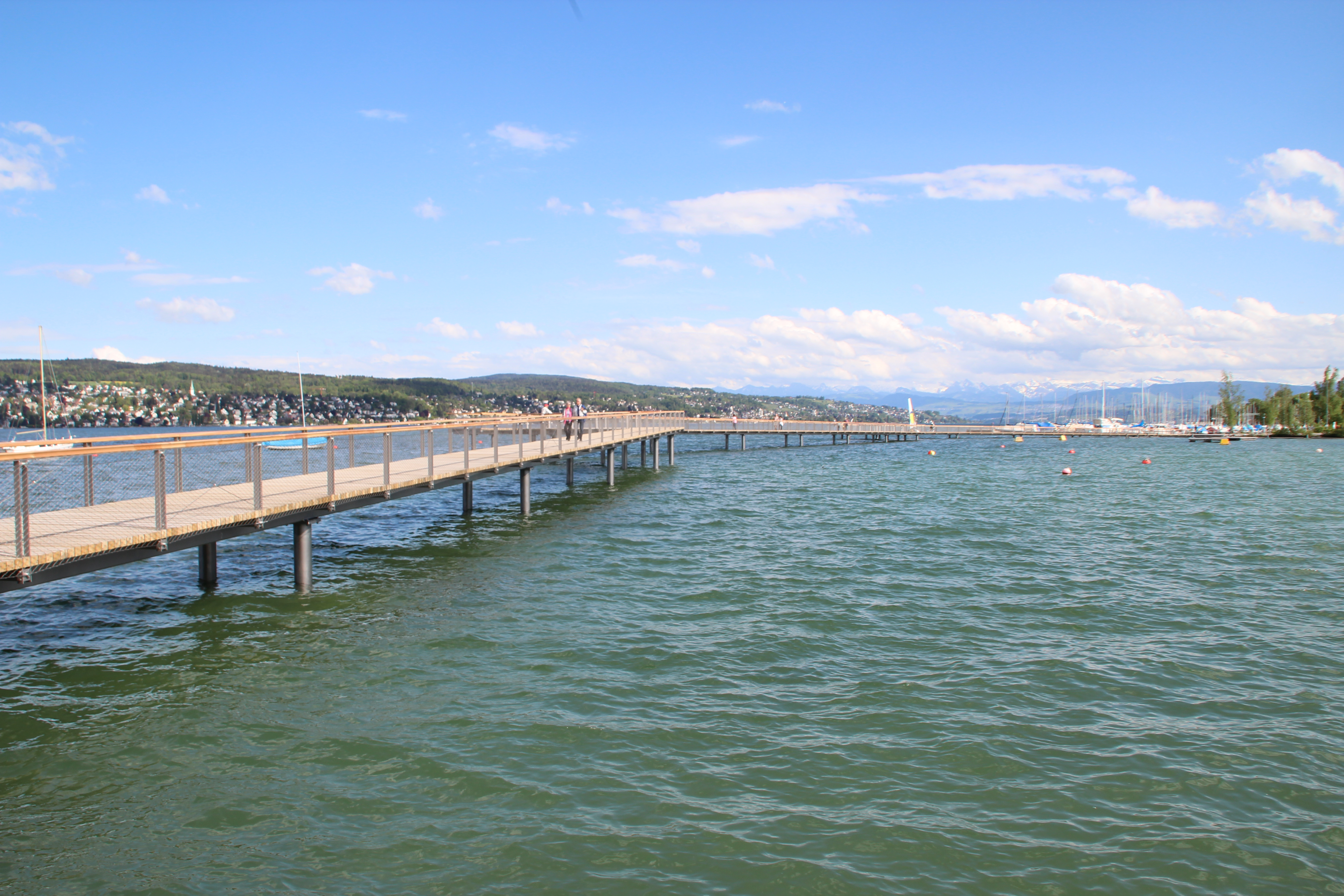 Cassiopeia-Steg in Zürich Wollishofen Blick nach Süden